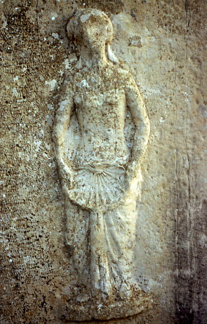 Ruines romaines de Thuburbo Majus, Tunisie - Femme tenant un coquillage sculpté sur un pilier